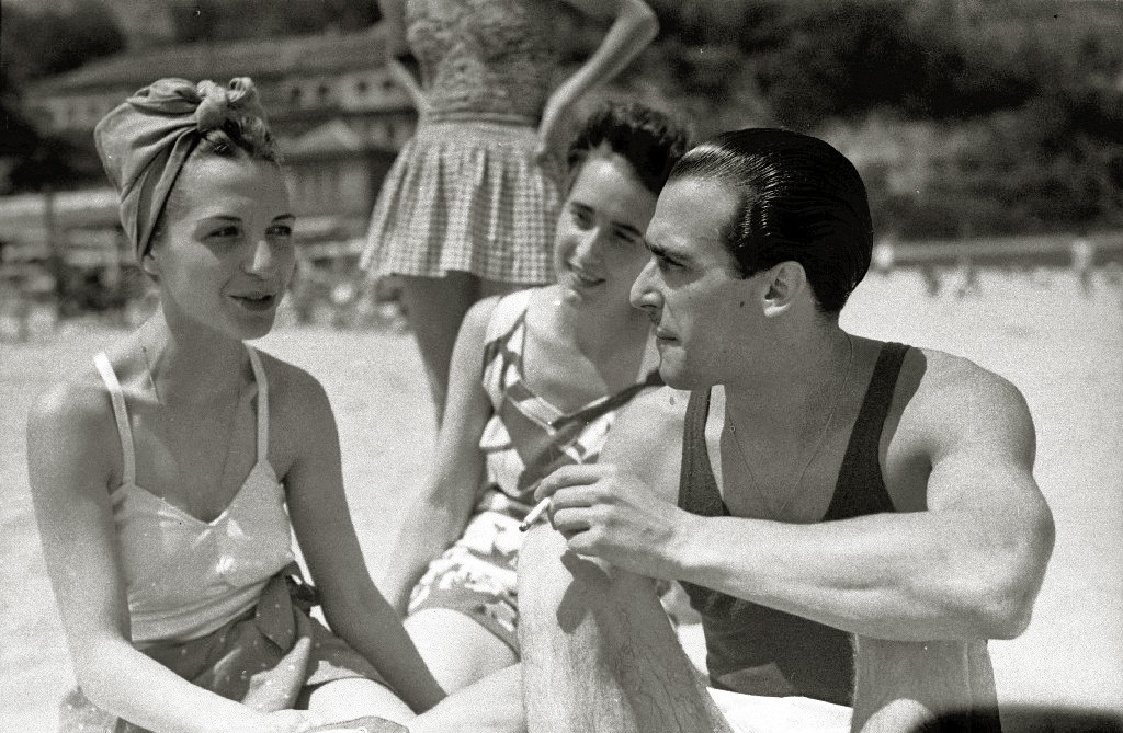 Título original: Los actores Luchi Soto y Luis Peña en la playa de Ondarreta (2/4) Localización: San Sebastián (Guipúzcoa)